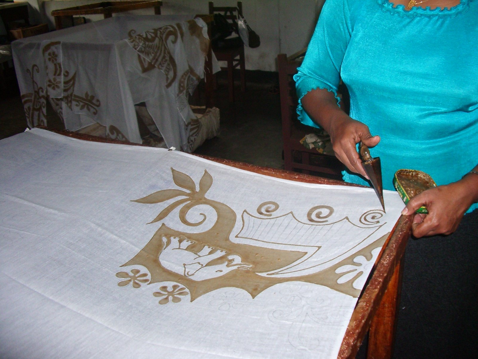 encerat previ a la coloració d'un batik, foto feta prop de Kandy per J. Ollé el juliol del 2006